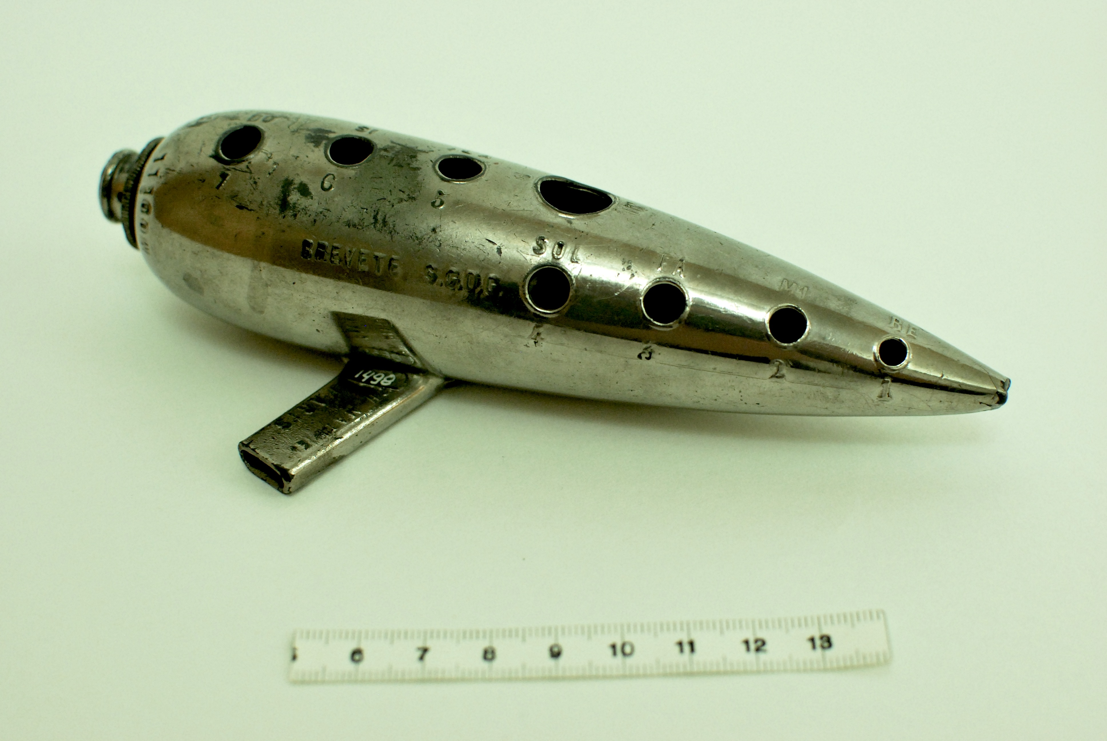 Ocarina by Mathieu, Ch. París. 1875. Museu de la Música. MDMB 1498